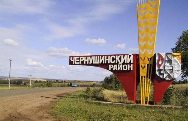 Въезд в Чернушинский район